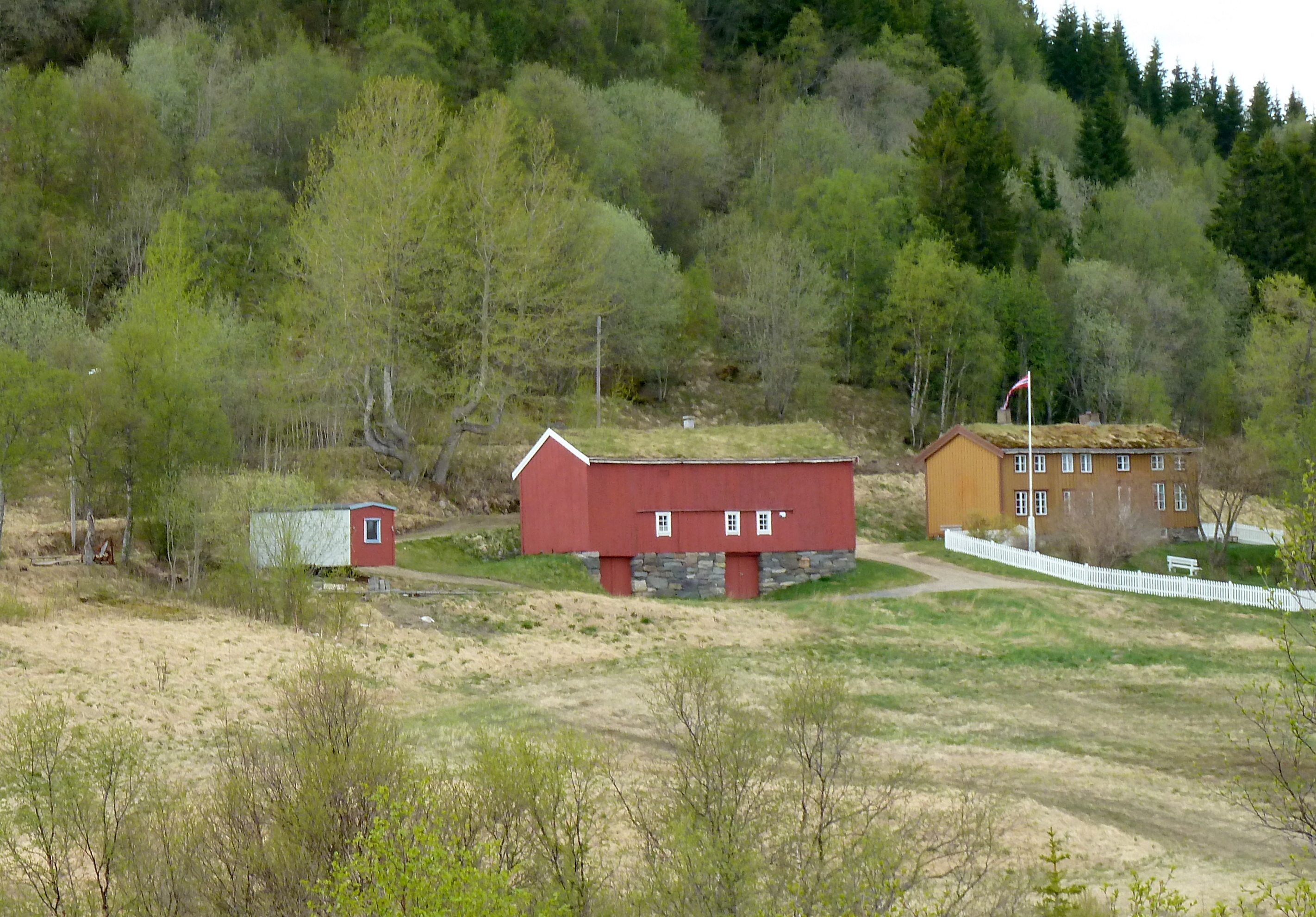 Knut Hamsuns første hjemsted i Hamarøy, Hamsund gård.